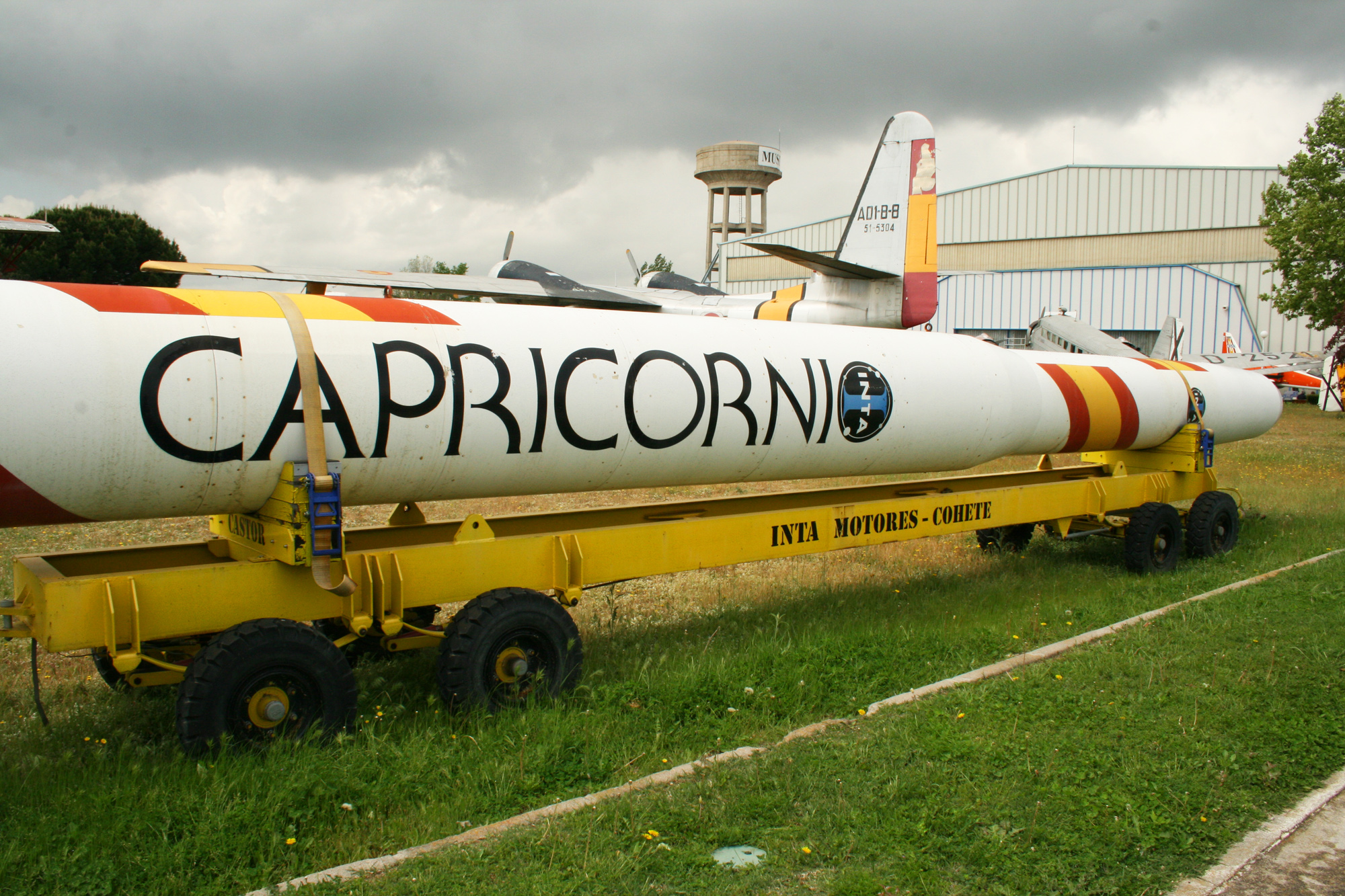 Maqueta a escala real del Cohete Capricornio, proyecto de lanzador de satélites artificiales desarrollado por INTA en España desde 1992 y cancelado en 2000. Museo del Aire de Cuatro Vientos (Madrid, España). Rocket Capricornio Real scale model of the Rocket Capricornio, project of artificial satellite launcher developed by INTA in Spain since 1992 and canceled in 2000. Museum of the Air of Cuatro Vientos (Madrid, Spain).